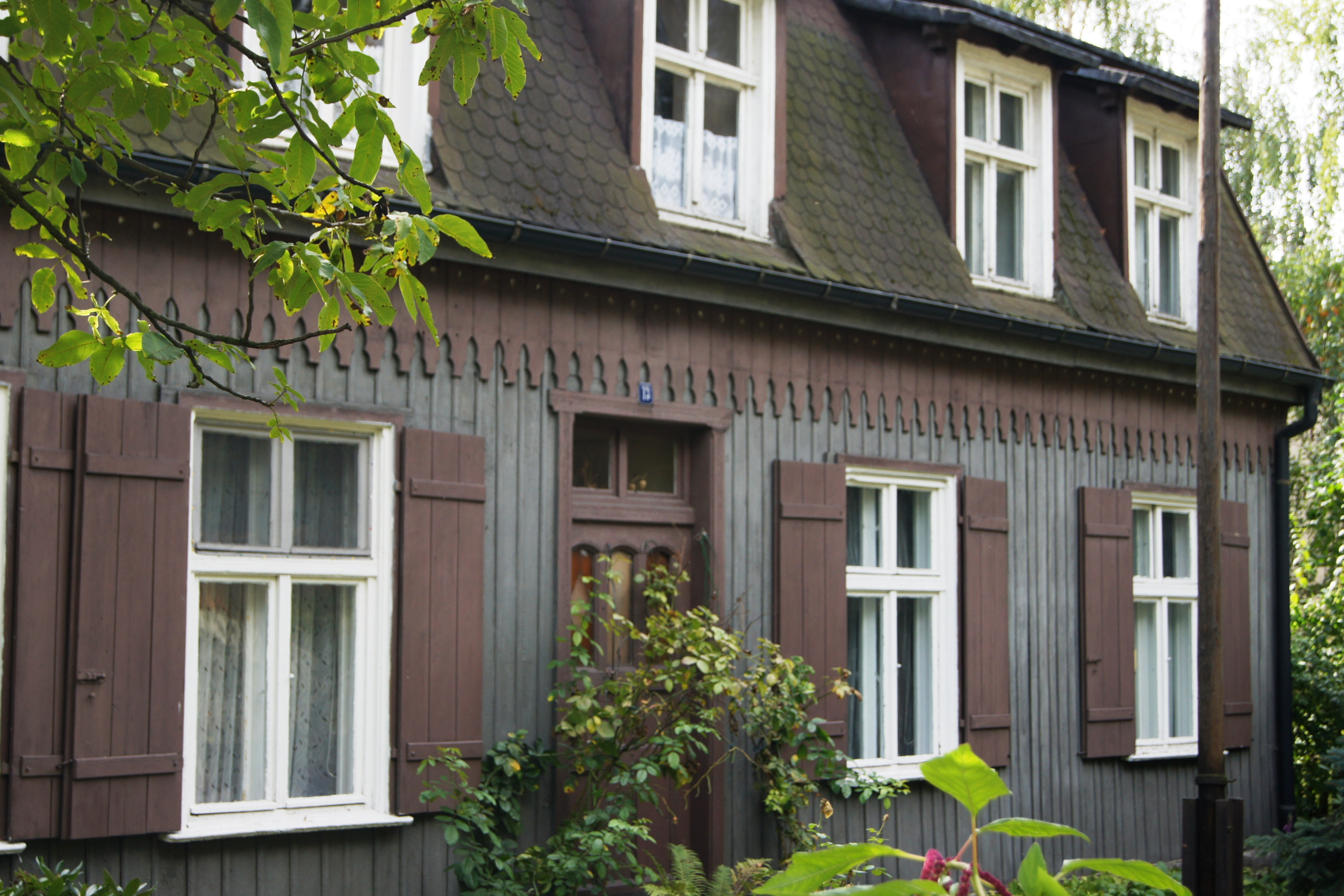 dom, drewn., 1896, ul. Rybaki 13